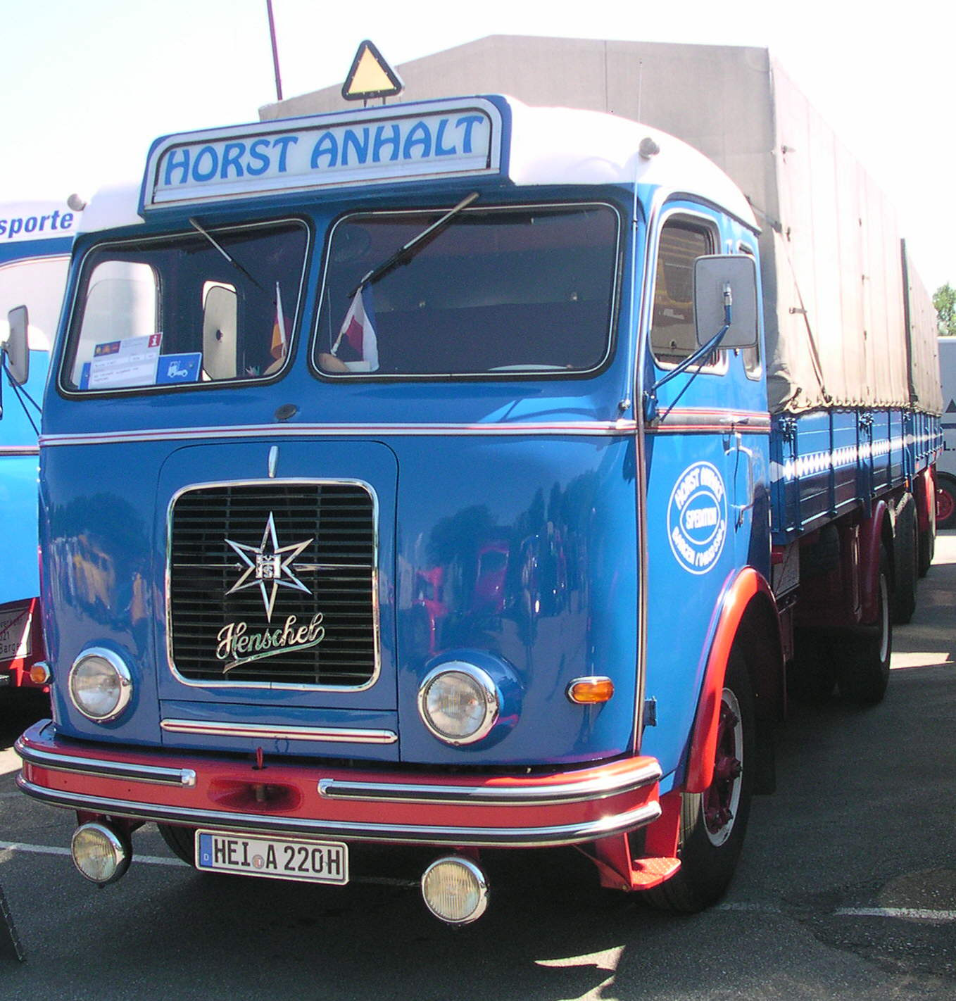 Wörth am Rhein, Oldtimer-Treffen bei Daimler-Chrysler Henschel HS 165 T, Baujahr 1956, 121 kW (165 PS)